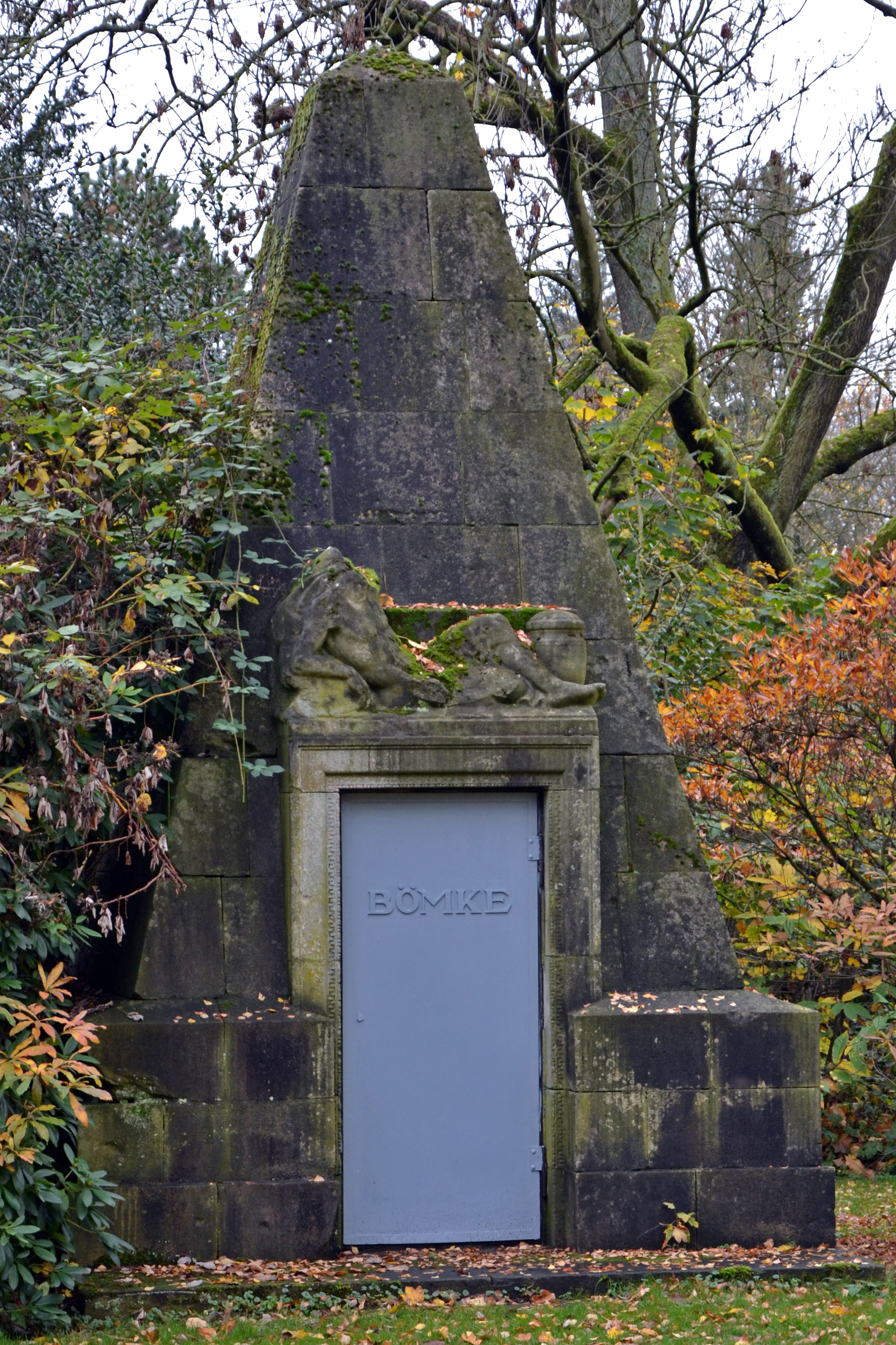 Essen, Ostfriedhof: Richard Bömke, Stadtverordneter der Stadt Essen, begehbare Gruft; Bömke war Kommerzienrat (Ernennung am 21. September 1898), geboren am 22. März 1846 in Essen, gestorben am 26. März 1907 in Essen, war von 1894 bis 1907 Mitglied und Vorsitzender des Aufsichtsrats der Gewerkschaft Friedrich der Große.